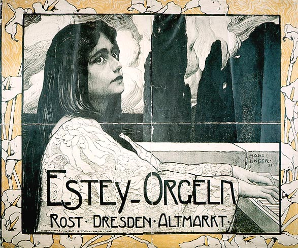 Estey Orgeln, 1896 (1072 x 1236 mm)